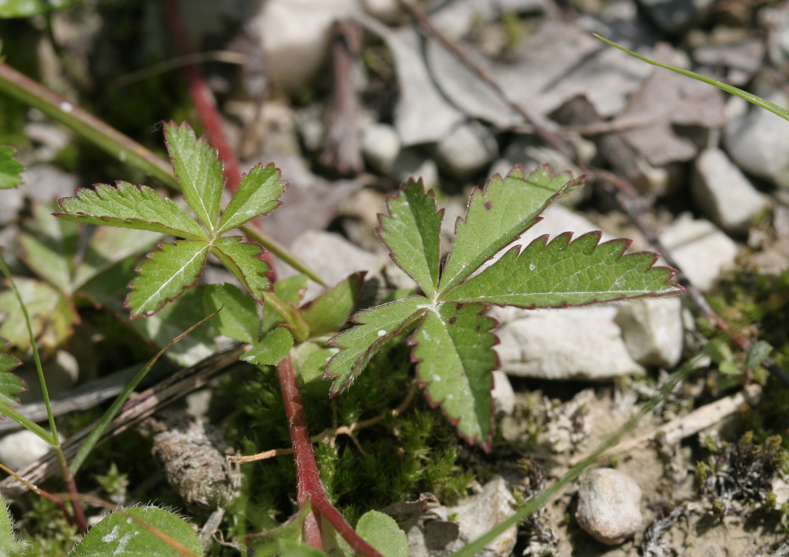 Potentilla_reptans (Cinquefoglia comune) Località Praloran, Limana (BL), quota 319 m s.l.m.